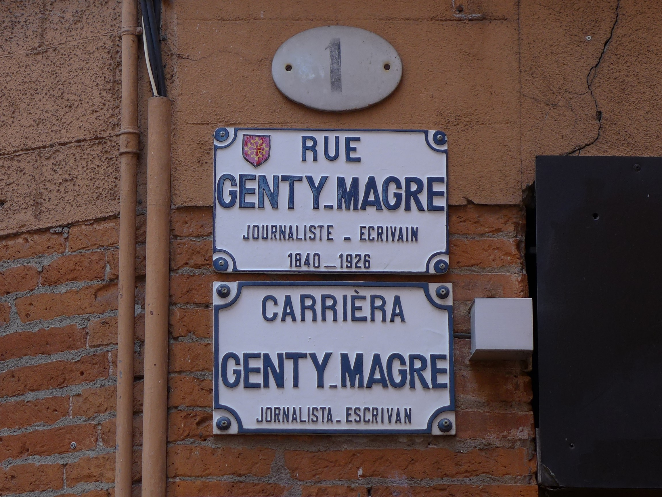 Rue Genty-Magre (Toulouse) - plaques de rue